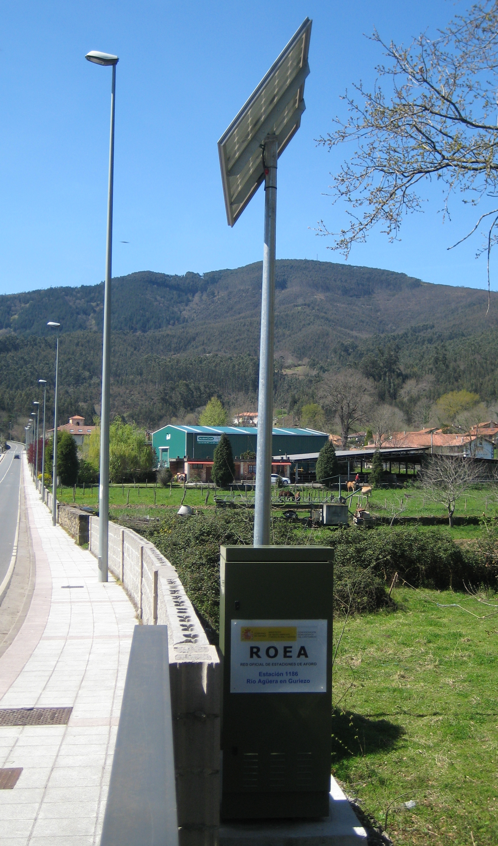 Estación de aforo 1186, de la Red Oficial de Estaciones de Aforo y de la Confederación Hidrográfica del Cantábrico, para controlar el río Agüera a su paso por Guriezo. Al fondo el barrio de La Magdalena.